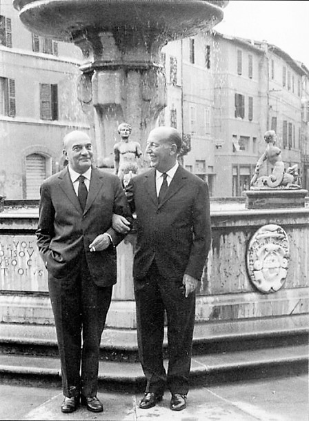 Libero Bigiaretti, a sinistra, con l'editore Valentino Bompiani